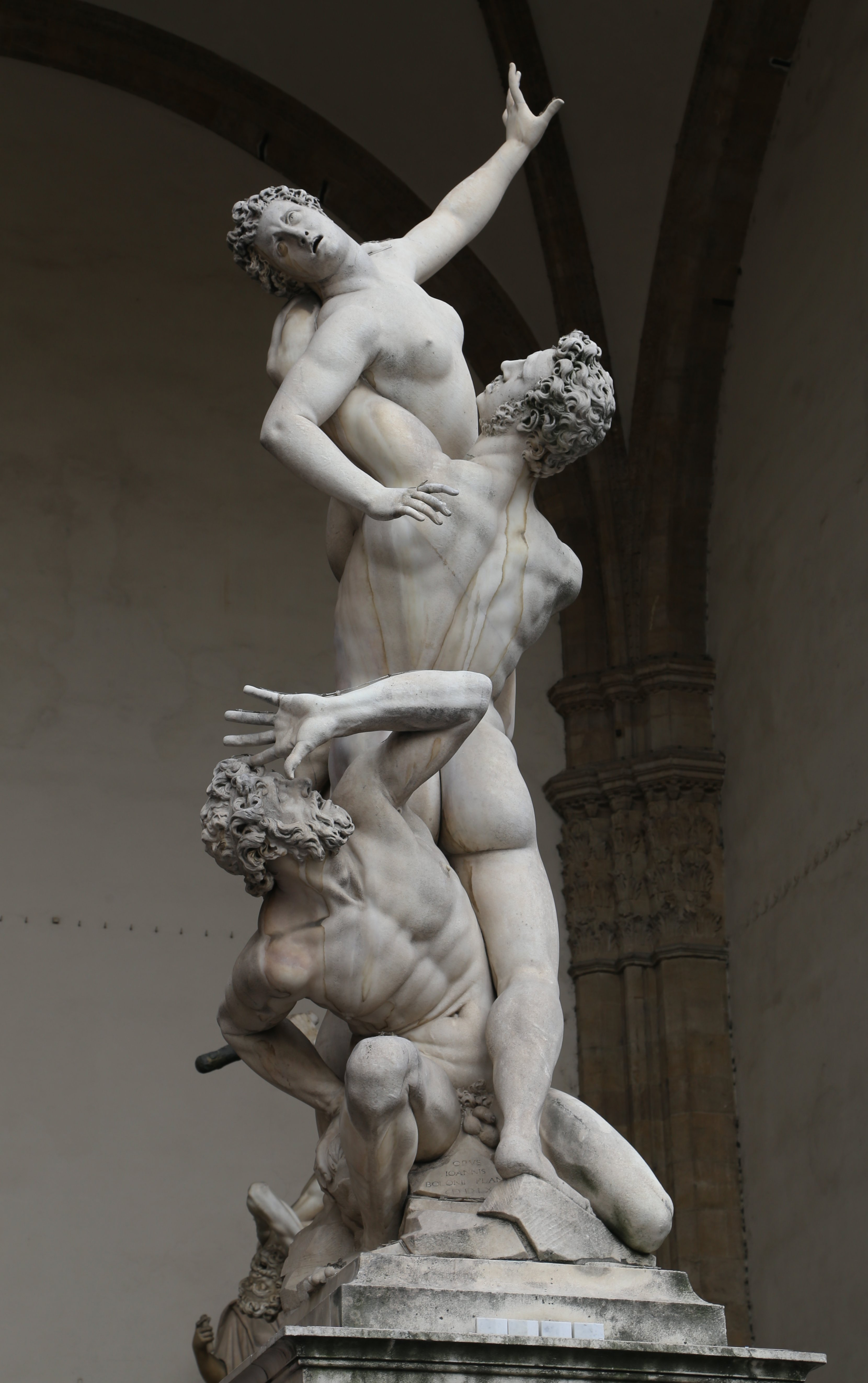 Der Raub der Sabinerinnen, Giambologna, Loggia dei Lanzi, Florenz